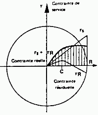 torsion 3